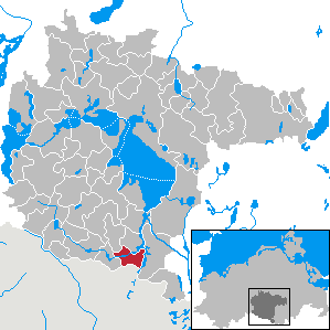 Buchholz in Mecklenburg-Western Pomerania - District Müritz